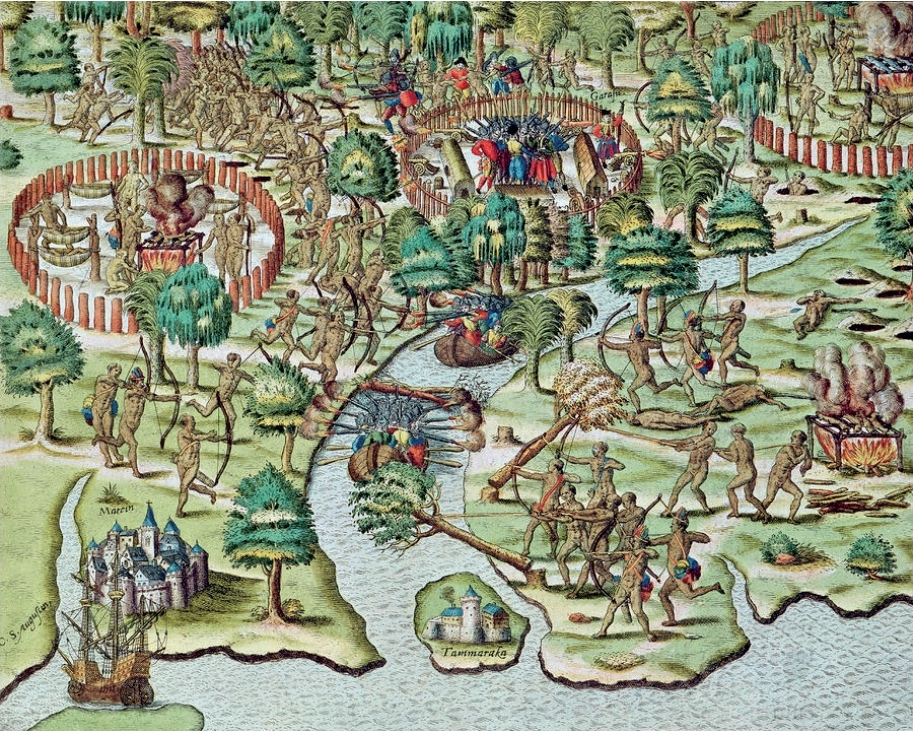 Gravura de Theodore de Bry representando os “cercos de Igarassu” em Pernambuco no ano de 1549. Reproduzida da edição original de 1557 em Marburgo, Alemanha, do livro de Hans Staden, Duas Viagens ao Brasil.